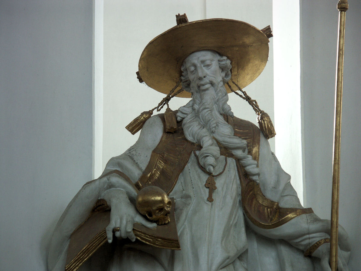 Wies church (Wieskirche), Germany